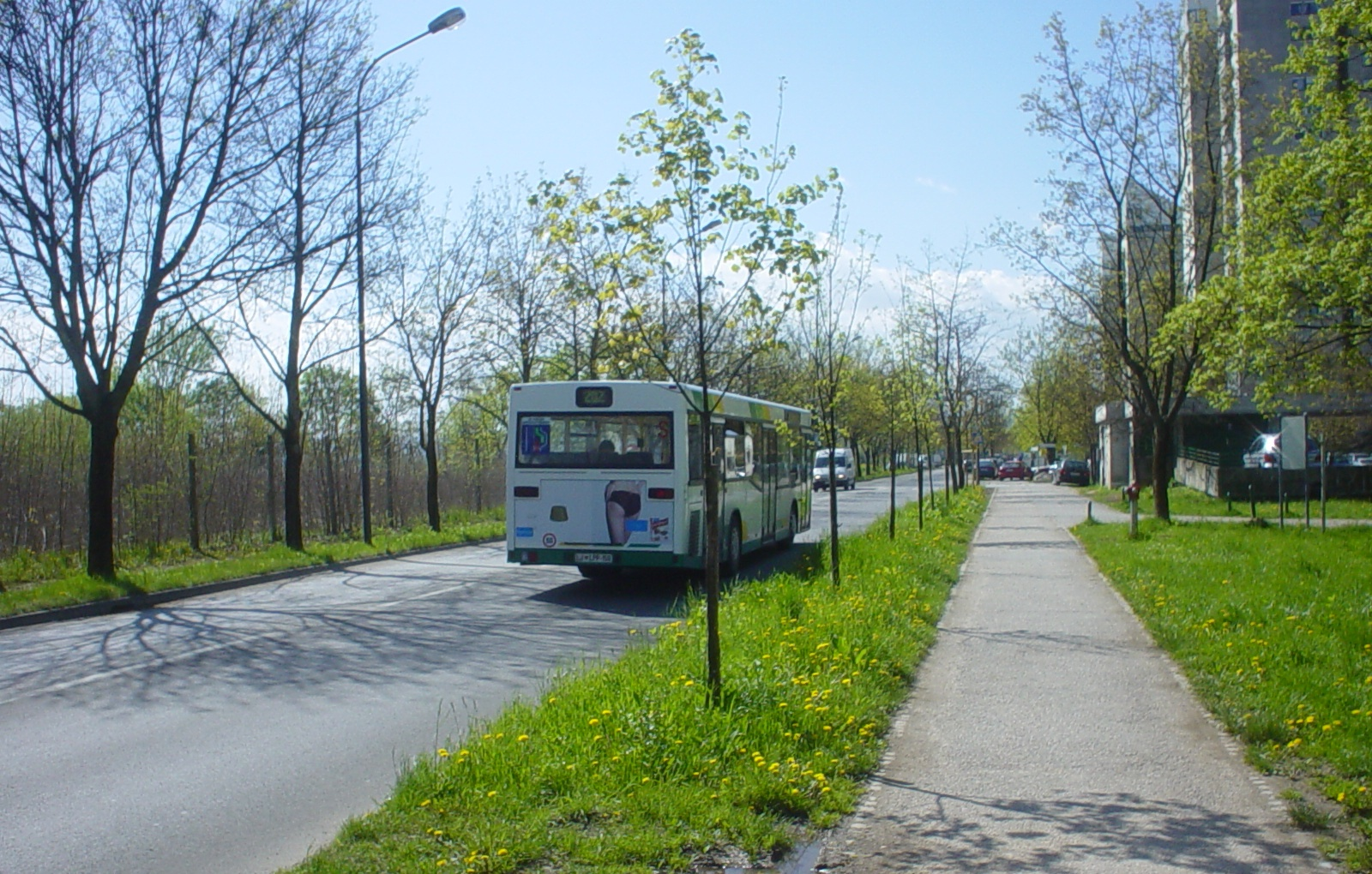 Vojkova ulica v Ljubljanai, Slovenija